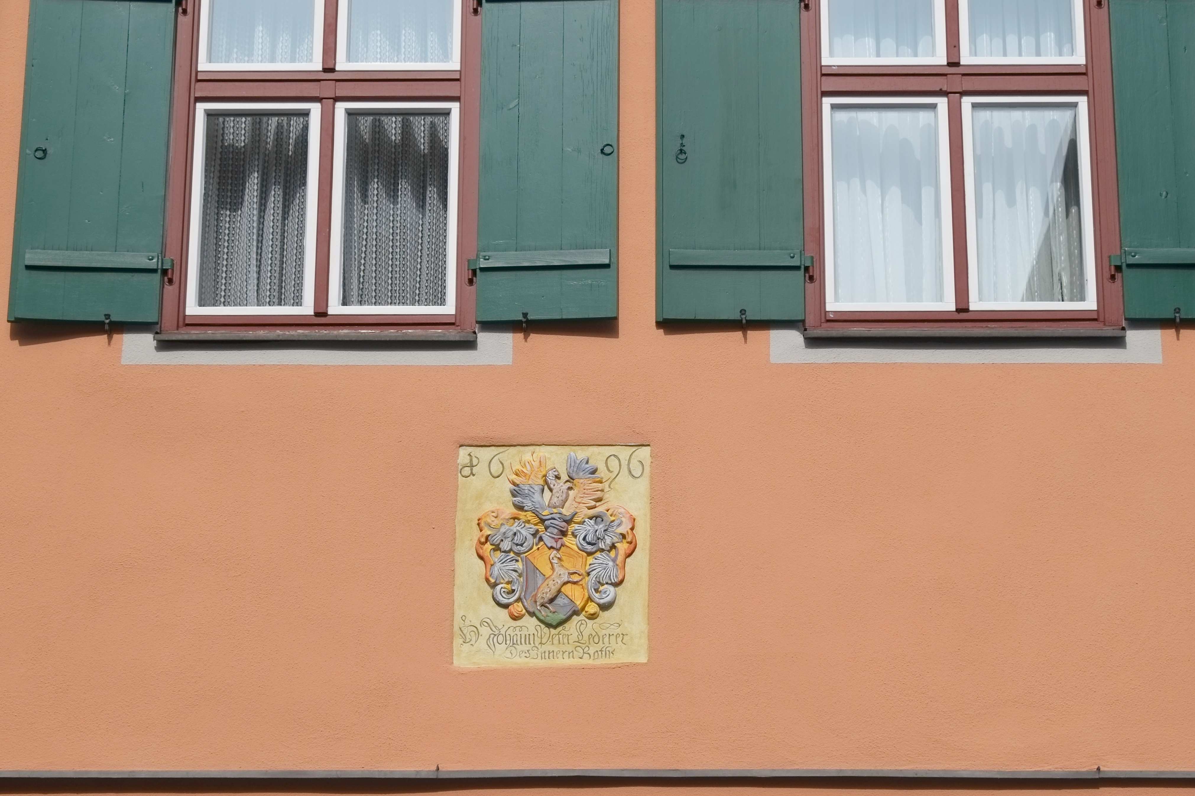 Wappen am Haus Lange Gasse 17 in Dinkelsbühl im Landkreis Ansbach (Bayern, Deutschland)